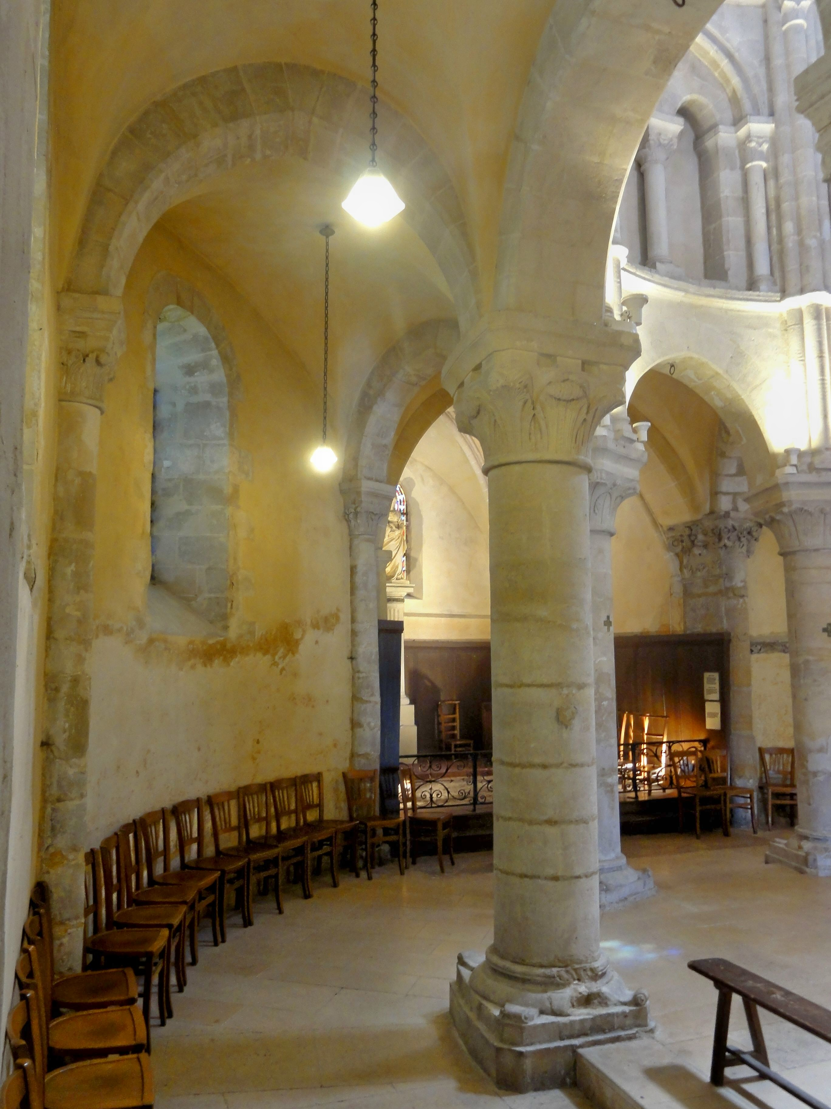 Déambulatoire.